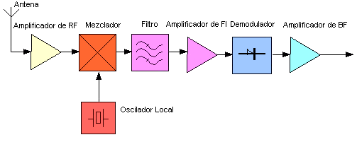 Diagrama de receptor superheterodino. Esta imagen procede de es::en:Image:Superhet.jpg, creada por el usuario GRAHAMUK. Los rótulos han sido traducidos por PACO 19:35 7 oct, 2004 (CEST) Calidad mejorada por Kordas 20:13 16 feb, 2007 (CET)